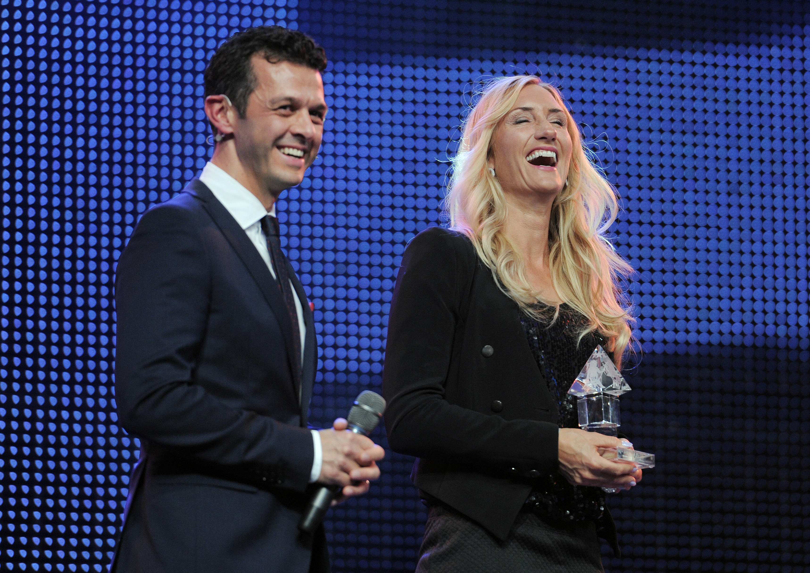 Davos, 03.10.2014. Sport, 12. Internationale Sportnacht Davos 2014. Moderator Jann Billetter und Tanja Frieden.. Copyright by: foto-net / Kurt Schorrer